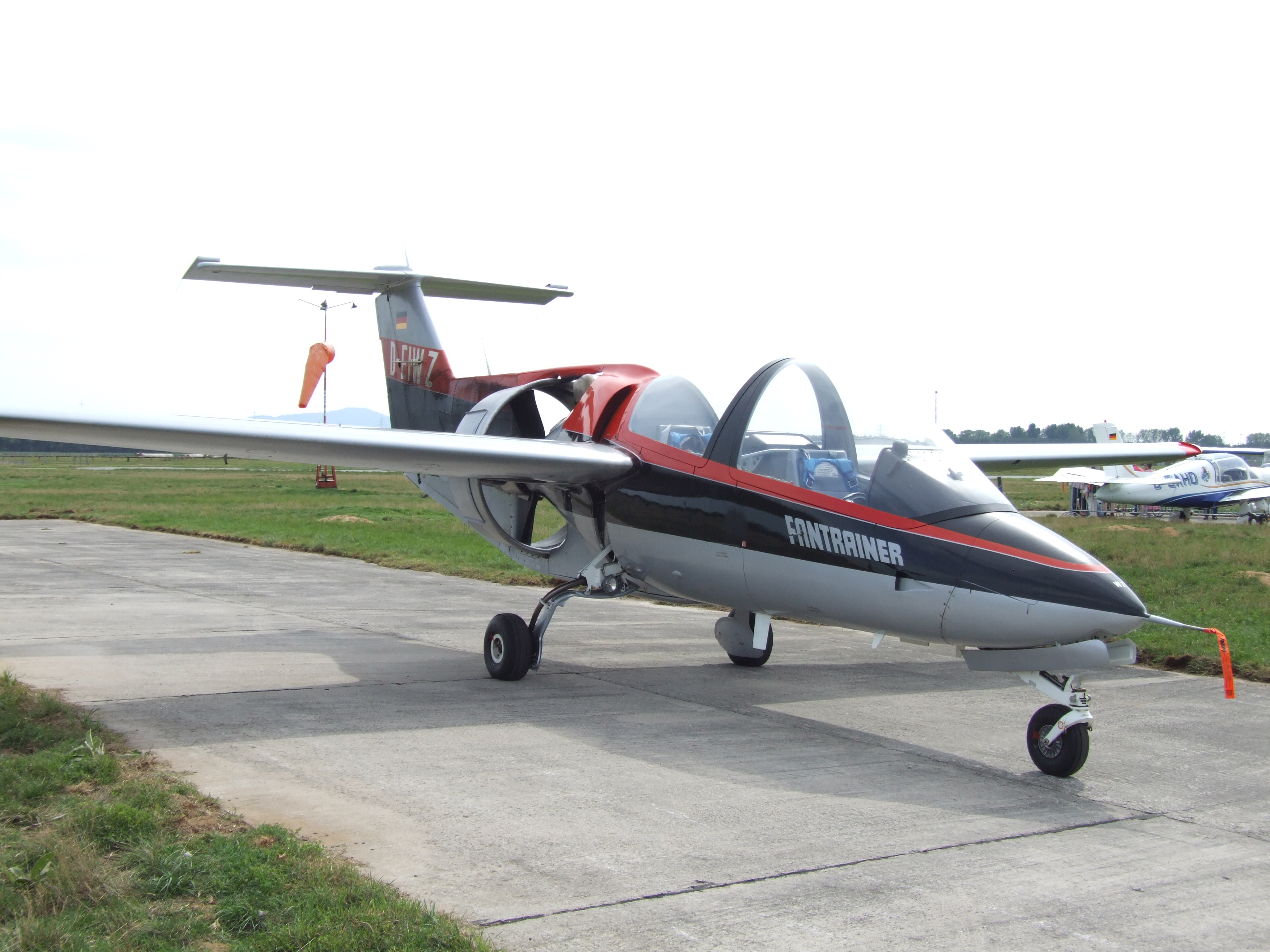 Flugtag August Euler Flugplatz Griesheim RFB Fantrainer